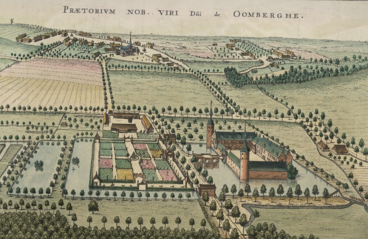 Het kasteel van Oombergen - deelgemeente van de stad Zottegem - Oost-Vlaanderen - België